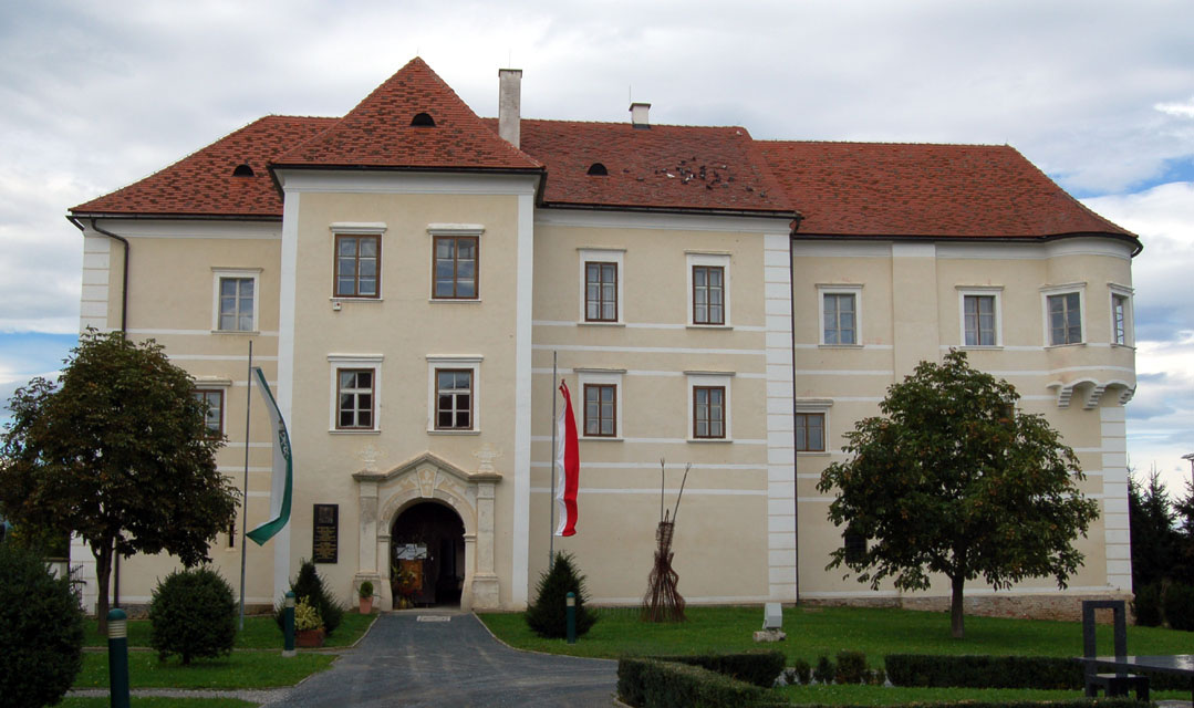 Schloss Burgau near river Lafnitz in Styria, Austria